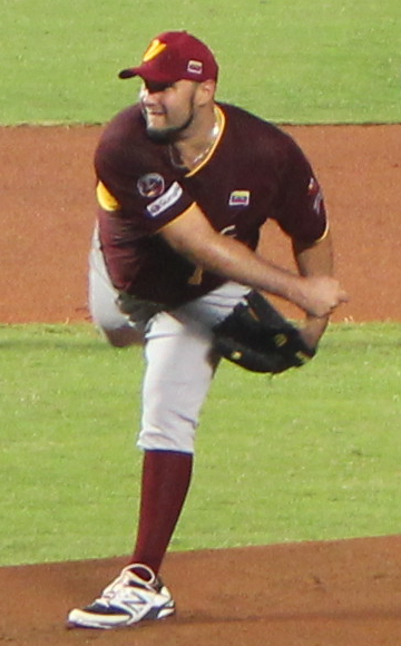 Felipe Paulino